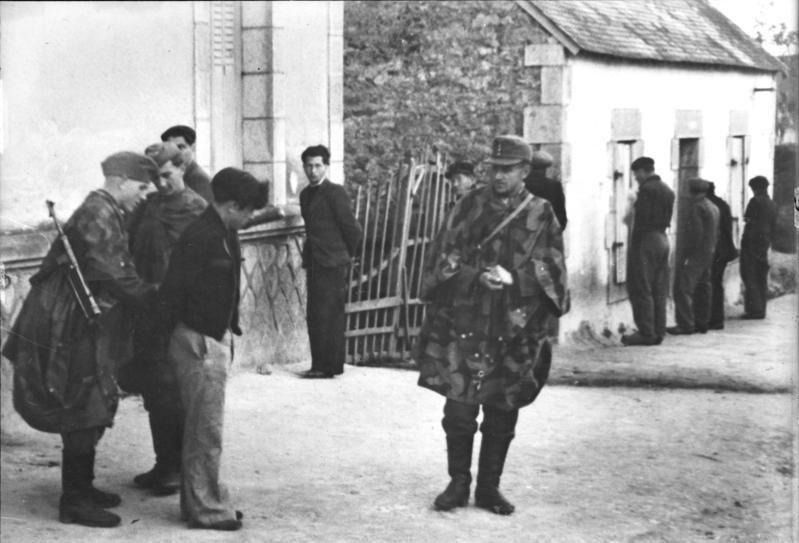 Scherl: Der rote Marquis in Frankreich Manche der Terroristen versuchen, beim Nahen der deutschen Streifen die Flucht zu ergreifen. Sie werden gefangen genommen, gefesselt und warten nun, isoliert an einer Hauswand stehend, auf ihre Abführung. Oft findet man unter ihnen durch kommunistische Hetzpropaganda verführte Jugendliche. PK Koll Information added by Wikimedia users.